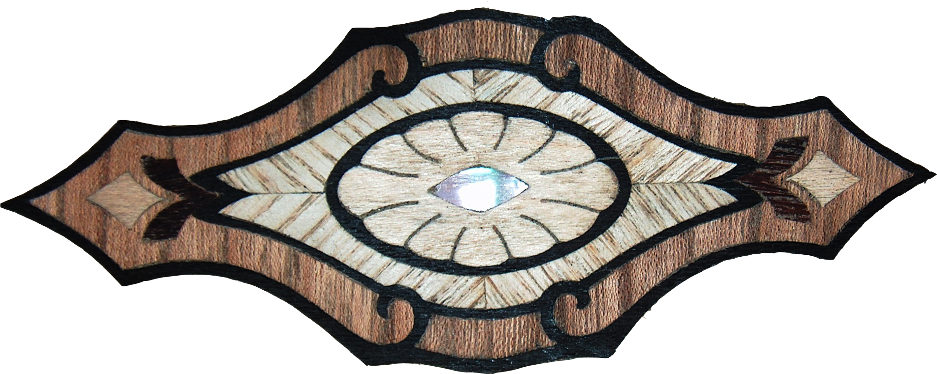 Intarsia